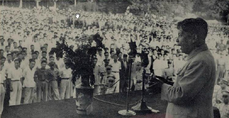 题名： 经济动荡中的上海:为了贯彻经济改革,国府特派蒋经国到上海区督导一切,实行“打虎”但一般人民则为了物价暗涨,展开抢购潮:上海市民抢购布匹情形:[照片] 文献来源： 《中美周报》 出版时间： 1948 年 卷期(页)： [ 第308期 ，1页 ] 中图分类号： D829.712